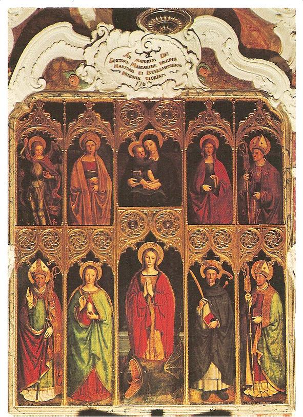 Retable du maître-autel, dit de Sainte-Marguerite de Louis Brea (XVe siècle), Eglise de Luceram, Alpes-Maritimes, France